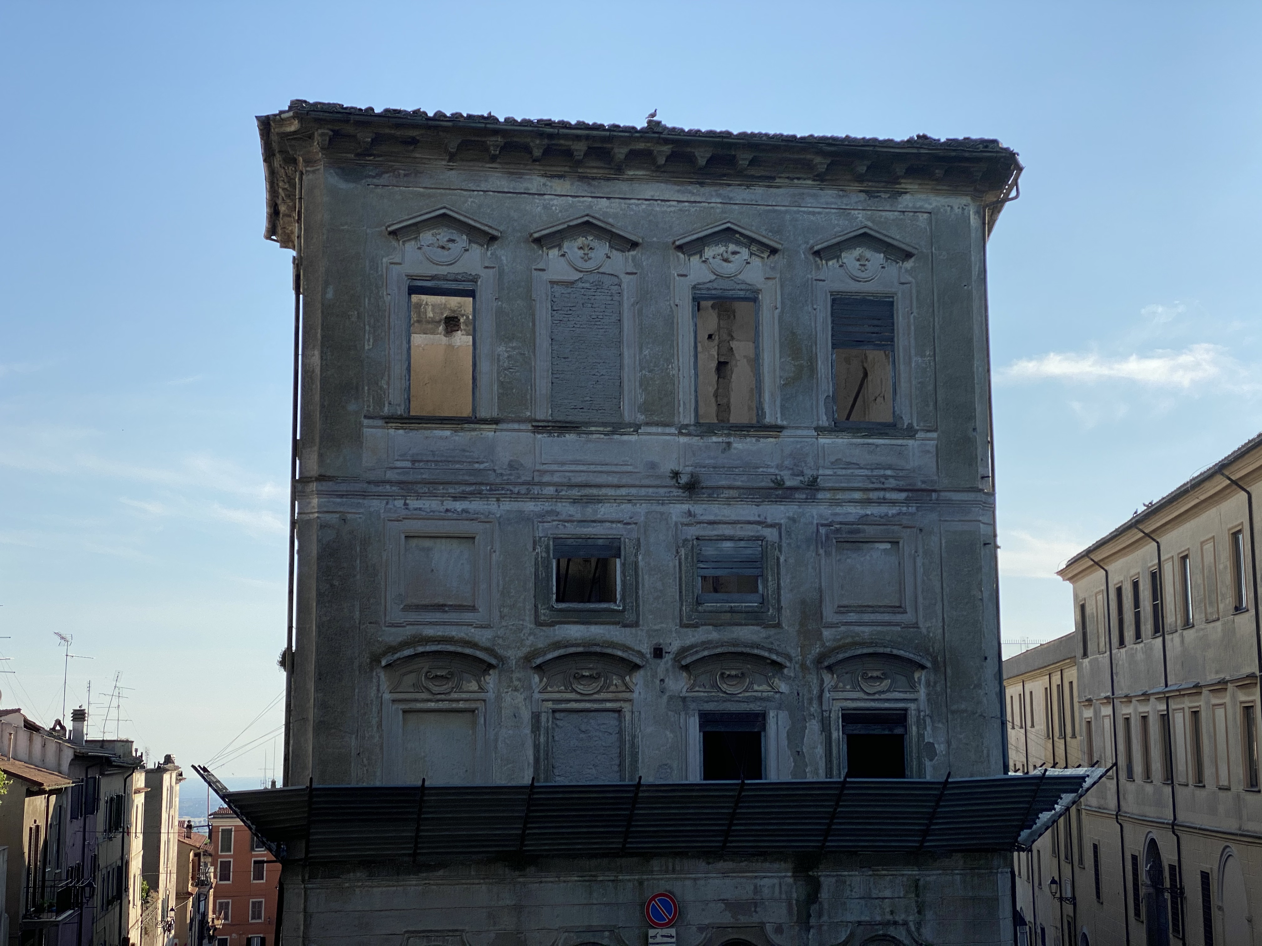 Facciata di Palazzo Pamphilj ad Albano verso Piazza San Paolo - giugno 2020